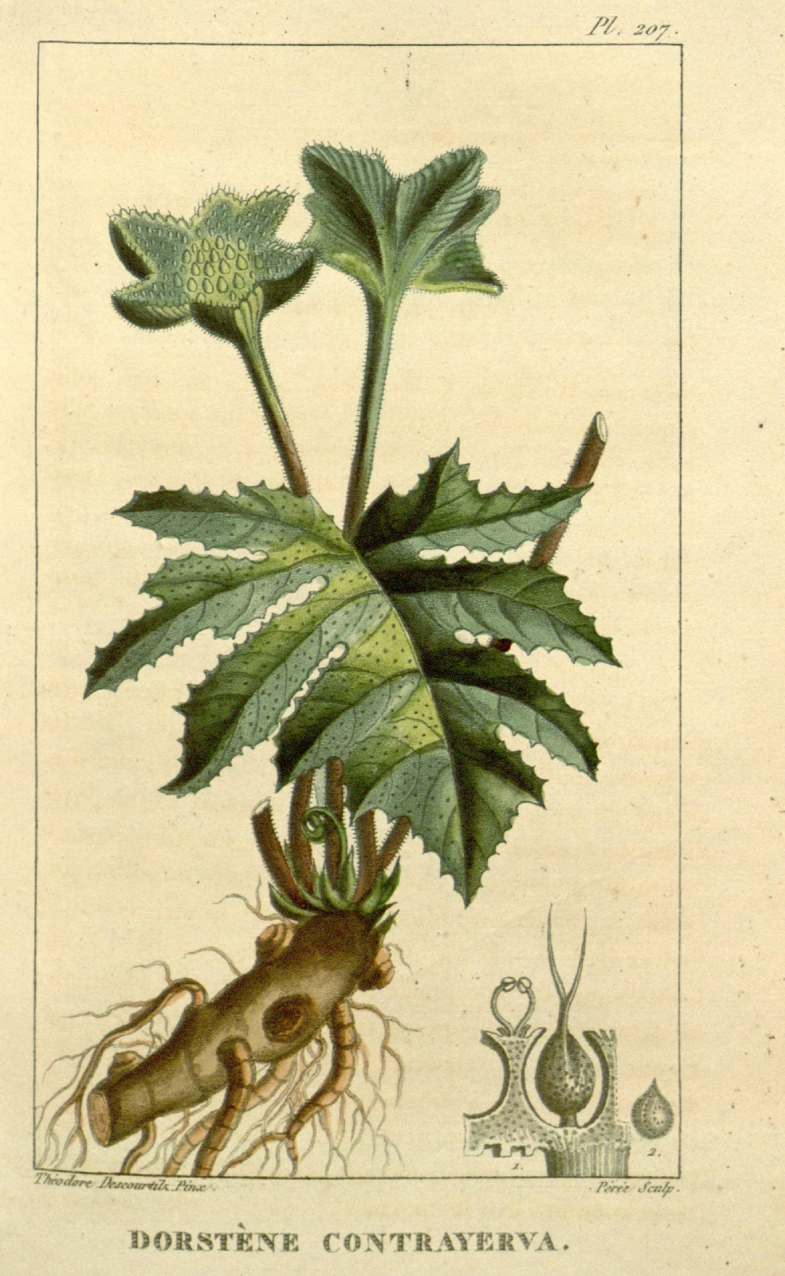 yv. 20/. inrodc W i*AK»iflp^2../*7fcr /Urrf ^.fcTzAr. Ï.0R5STENE CONTRAYERVA.